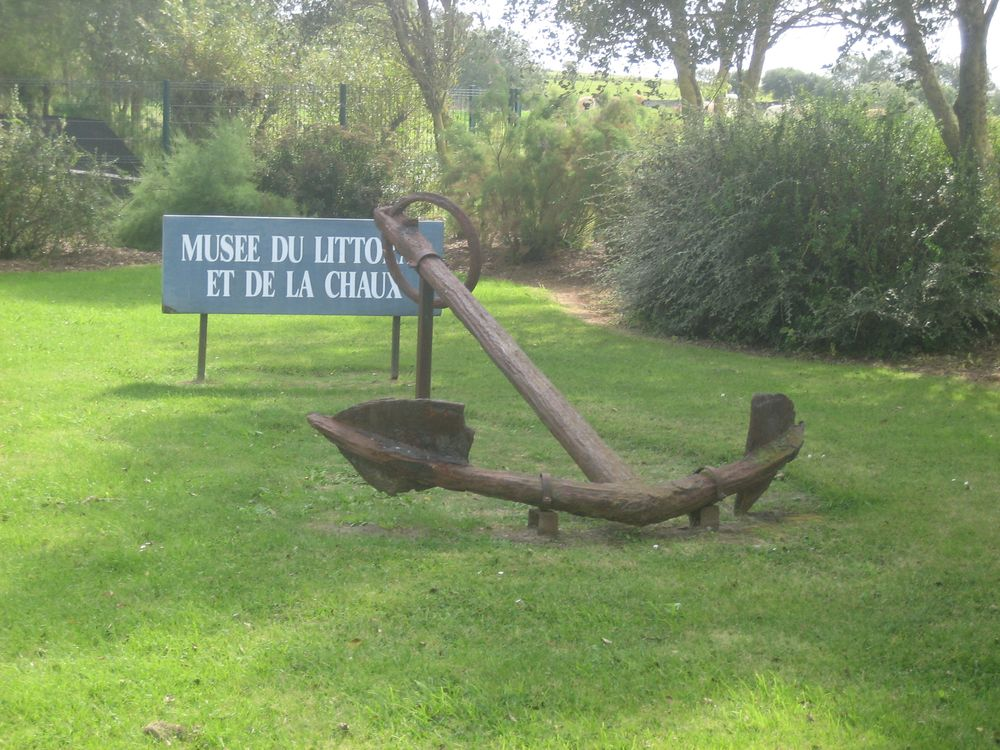 Regnéville-sur-Mer (Manche) : entrée du musée du littoral et de la chaux